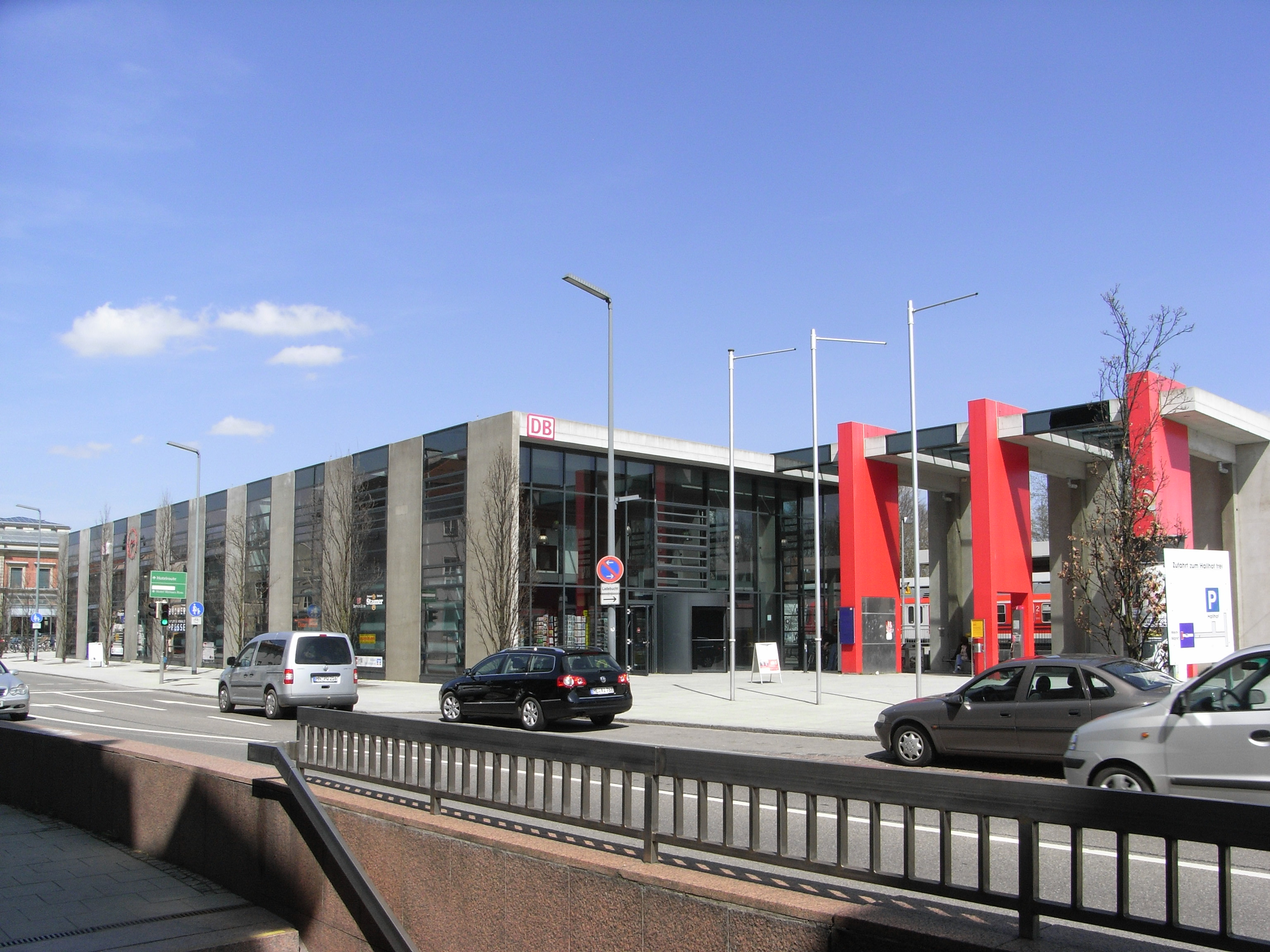 Der wohl einzige Bahnhof seiner Bauart (Modulbauweise) in Memmingen